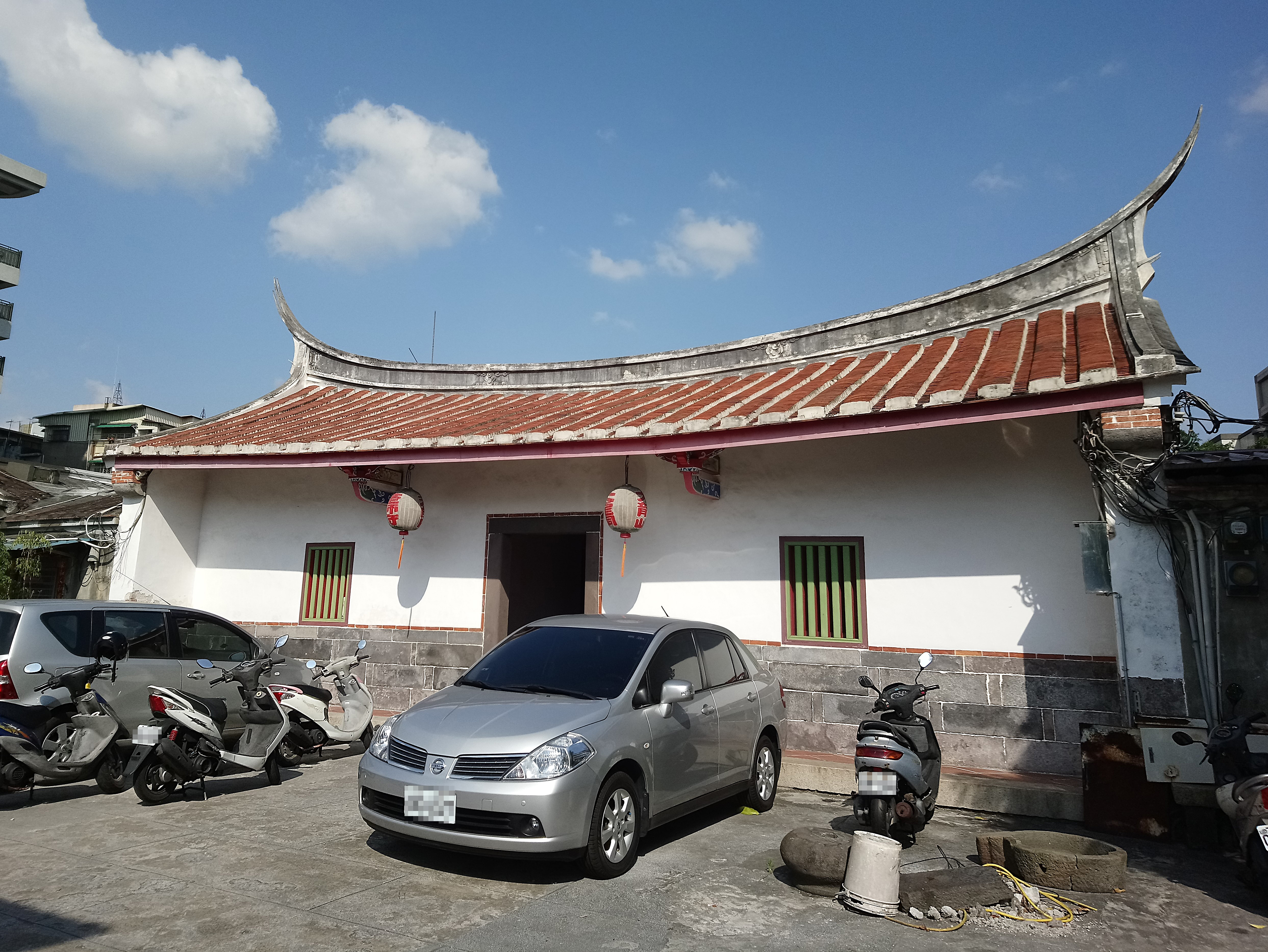 陳悅記祖宅公媽廳,臺北市大同區蘭州次分區老師里